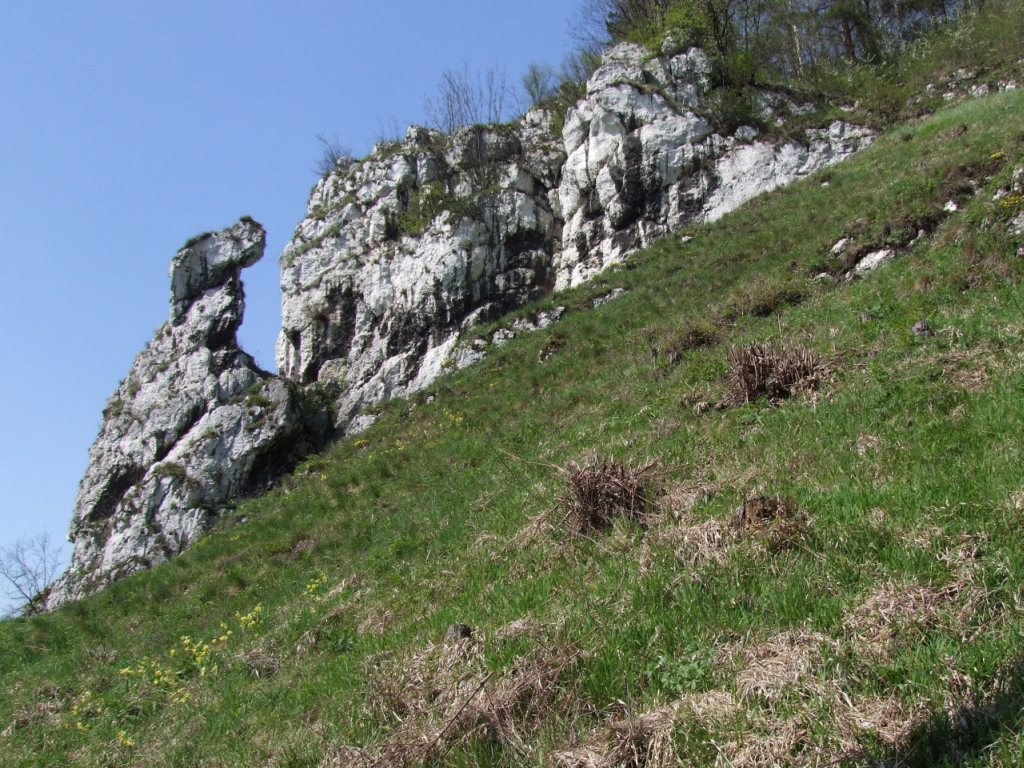 Skamieniały Wędrowiec (Ojcowski Park Narodowy)